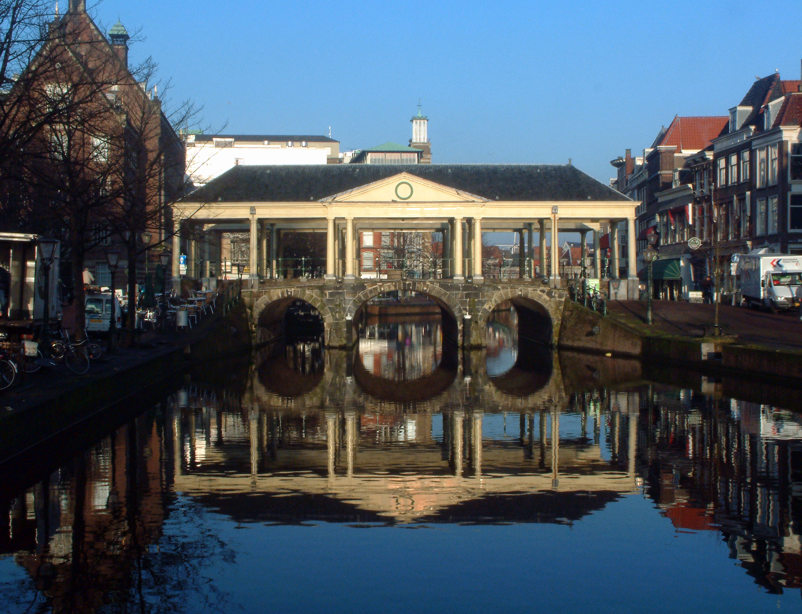 Korenbeursbrug op NieuweRihn, Leiden Koornbrug Leiden